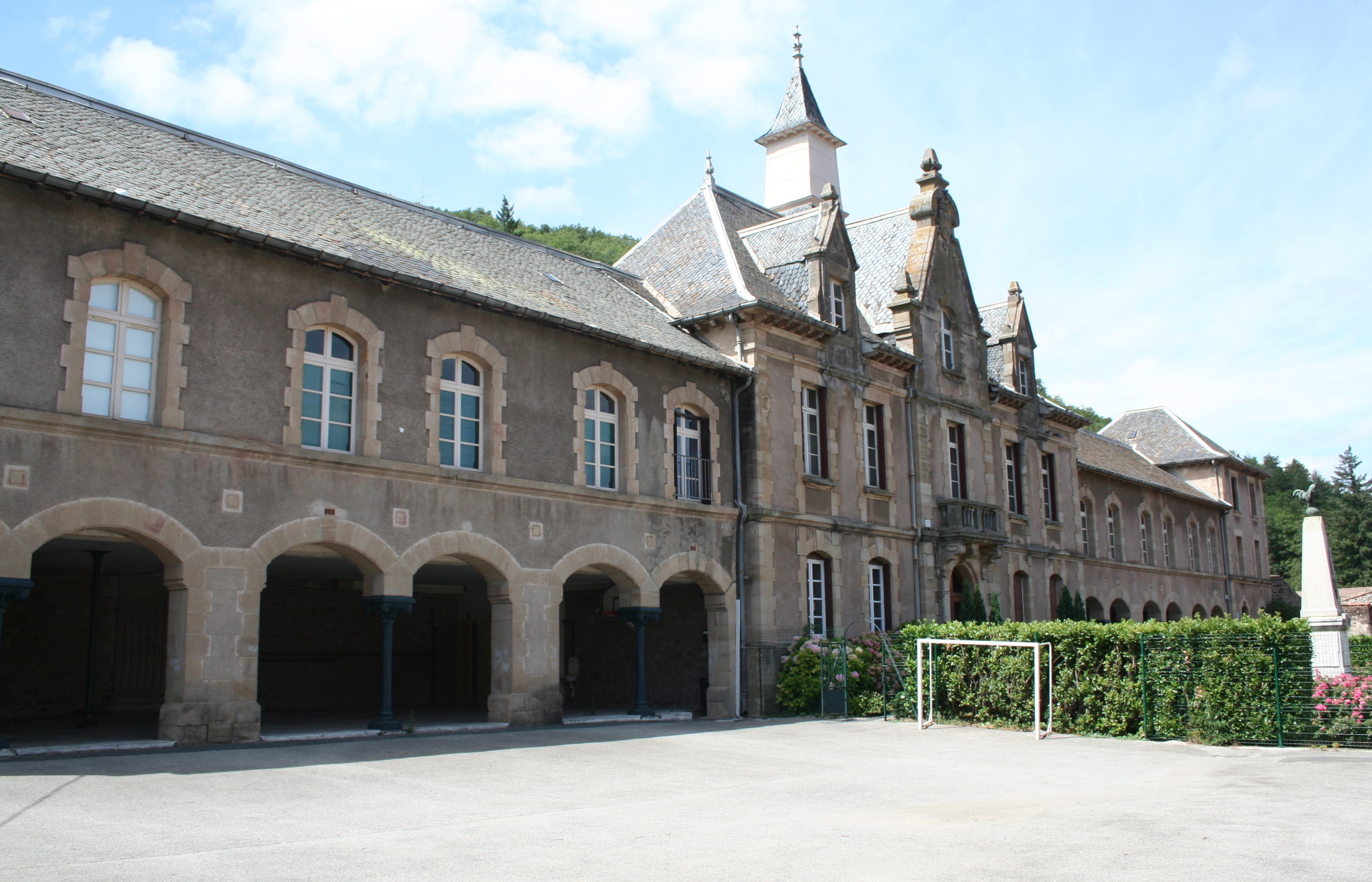 Camarès (Aveyron) - mairie et école.